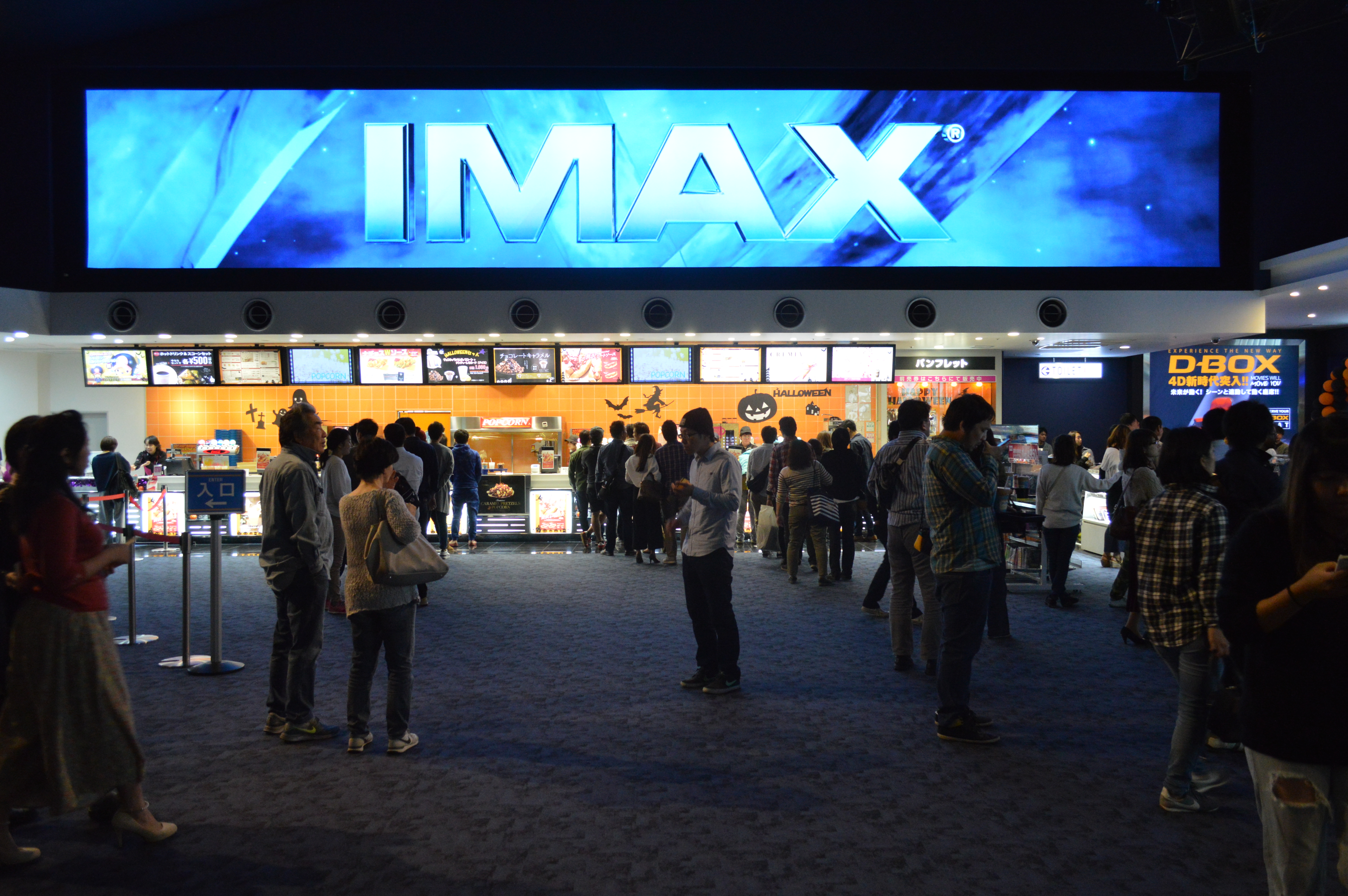 愛知県名古屋市緑区の映画館「イオンシネマ大高」。